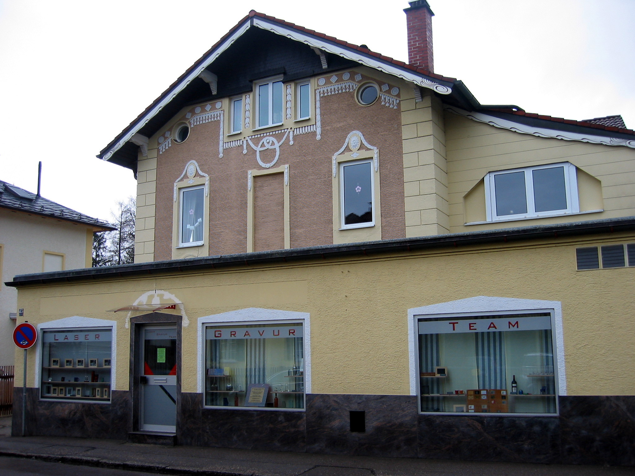 Krailling Landhaus des Architekten Martin Dülfer